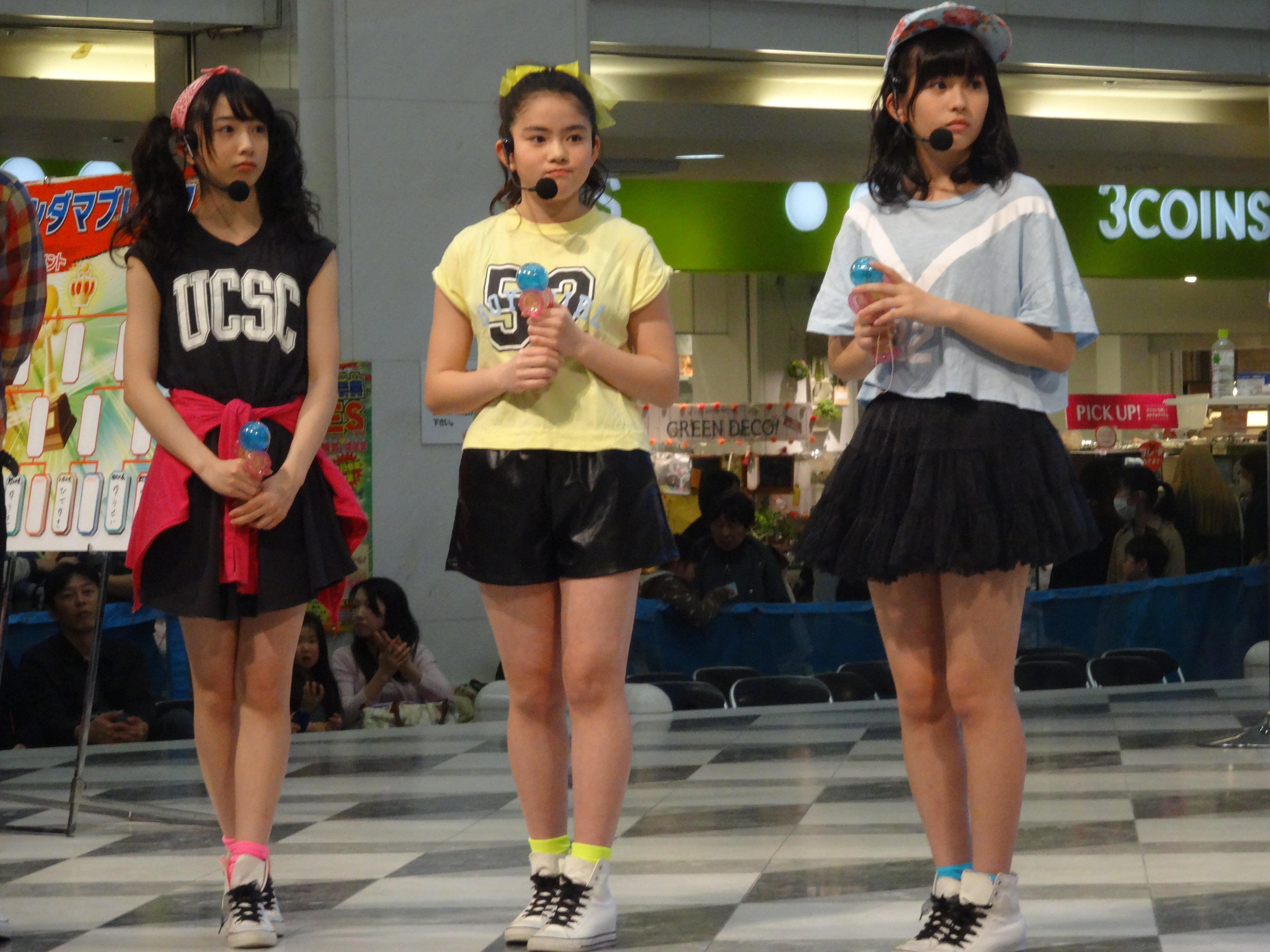 おはガールふわわ。2015年3月15日にサンシャインシティで行われた『KDX FES 日本一決定戦』にて。